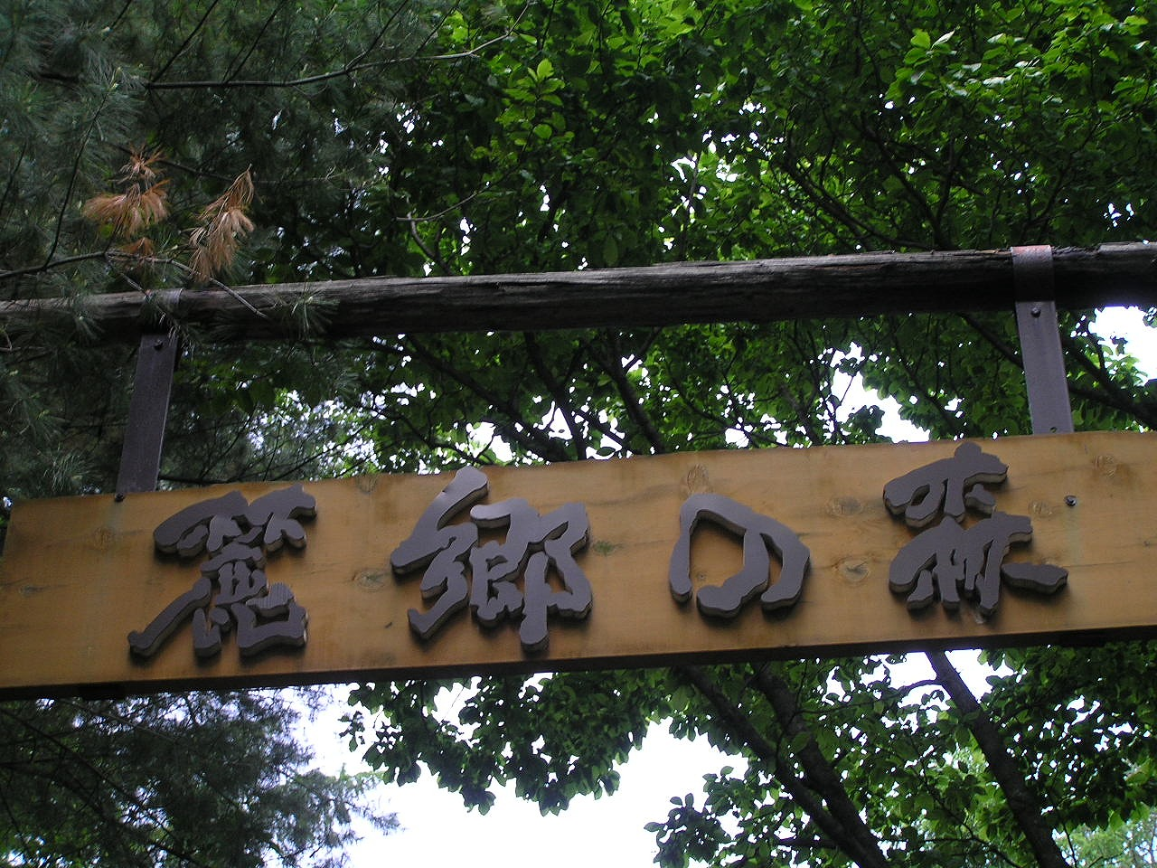 麓郷の森 入り口木の看板IMG Akiyoshi's Room